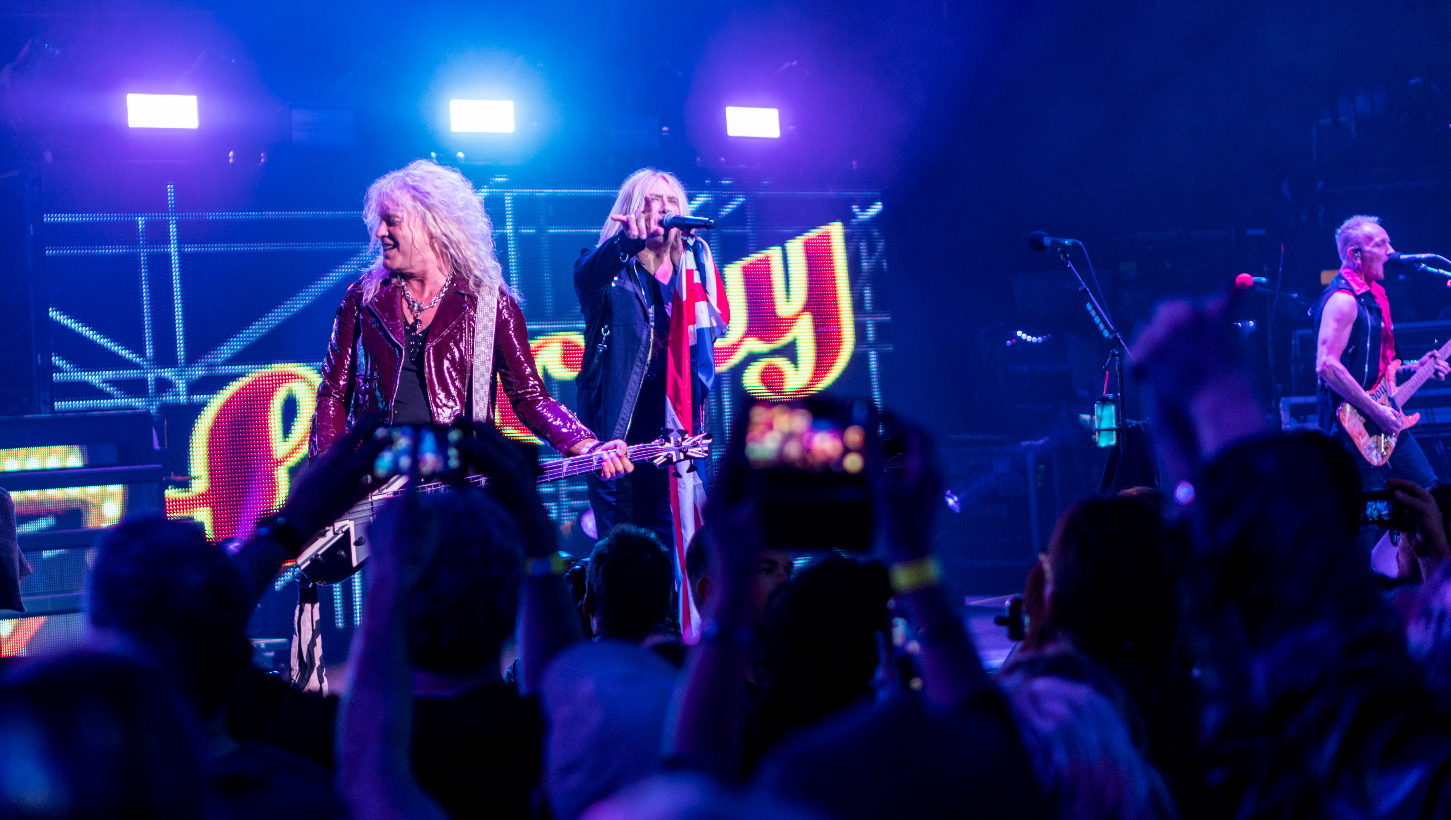 DefLepRAH250318-12